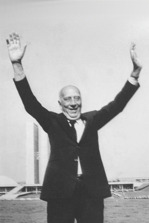 Brasília - Foto do ex-deputado Ulysses Guimarães de braços erguidos em frente ao Congresso Nacional na exposição de fotos dos 15 anos da Constituinte - (Foto Roosewelt Pinheiro/ABr - vert. 31)